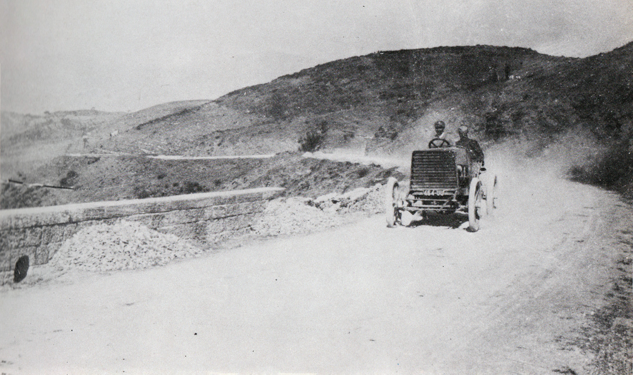 Coppa della Consuma 1902. Auto in gara. Da notare come la vettura nonostante abbia una gomma a terra continui a correre in quanto è vicina al traguardo